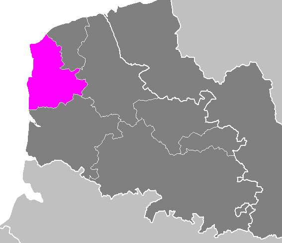 Arrondissement_de Boulogne-sur-Mer